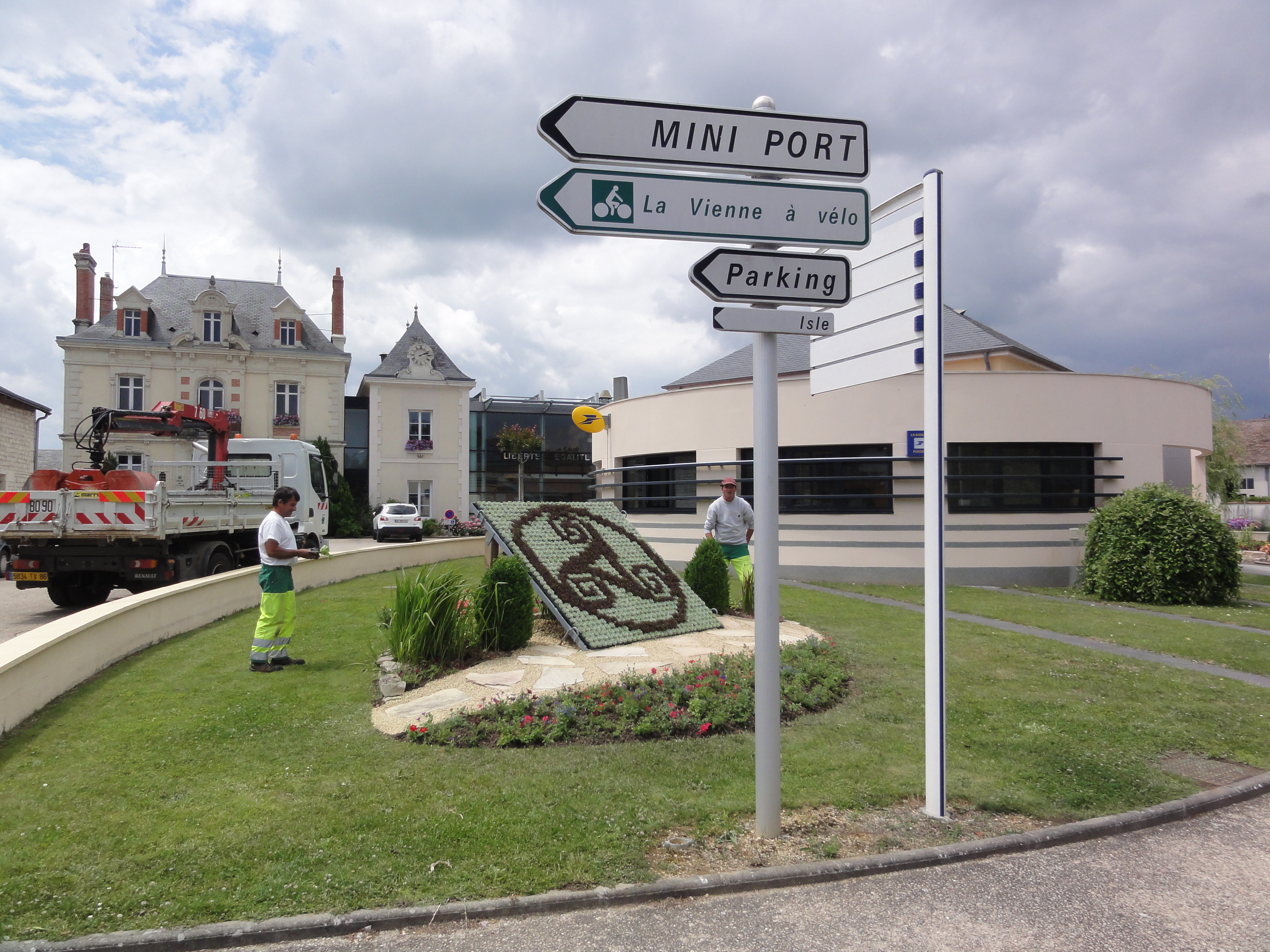 Cenon-sur-Vienne, la Vienne en vélo, place de la Mairie